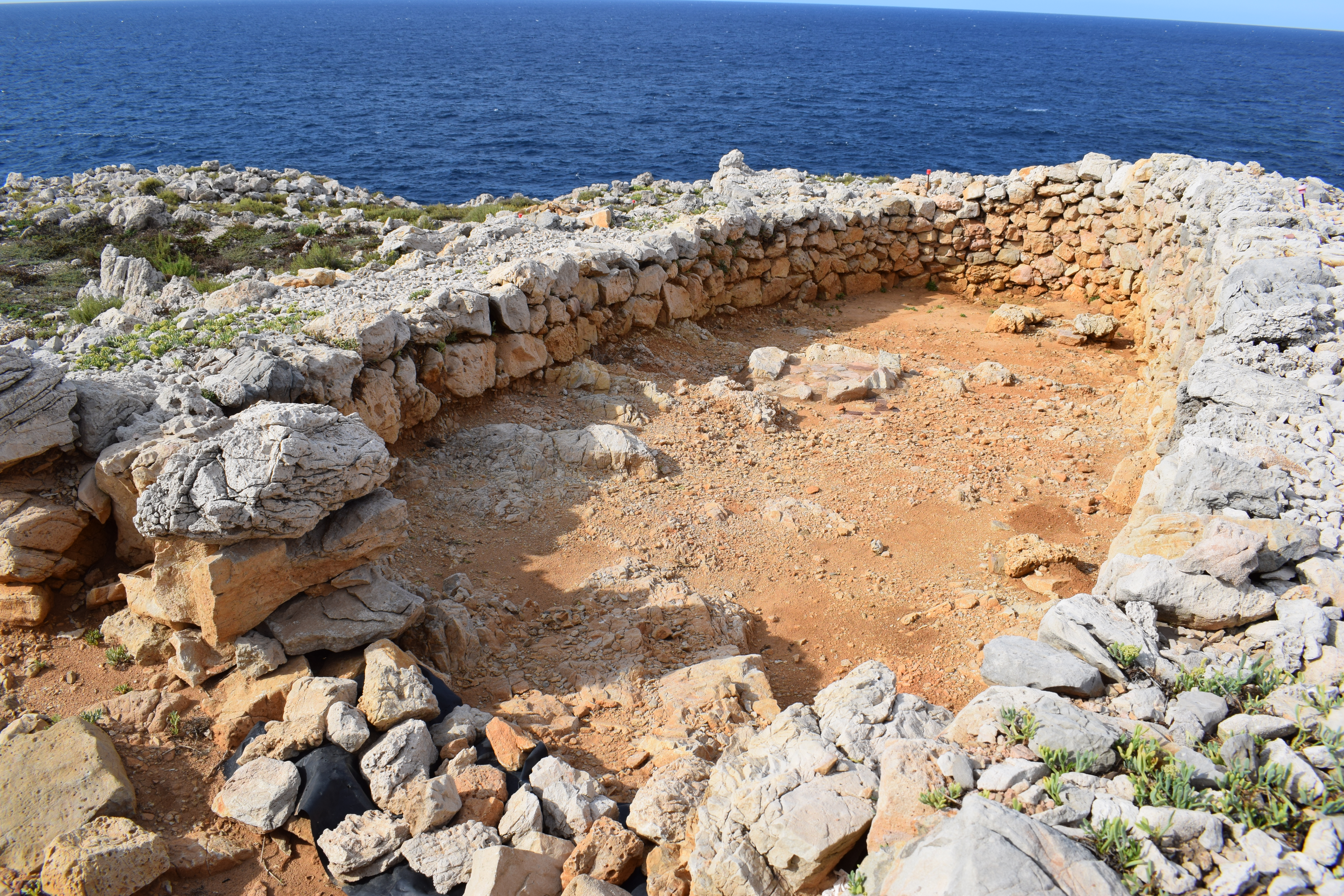 Reste eines naviformen Hauses in der Küstensiedlung von Cala Morell.